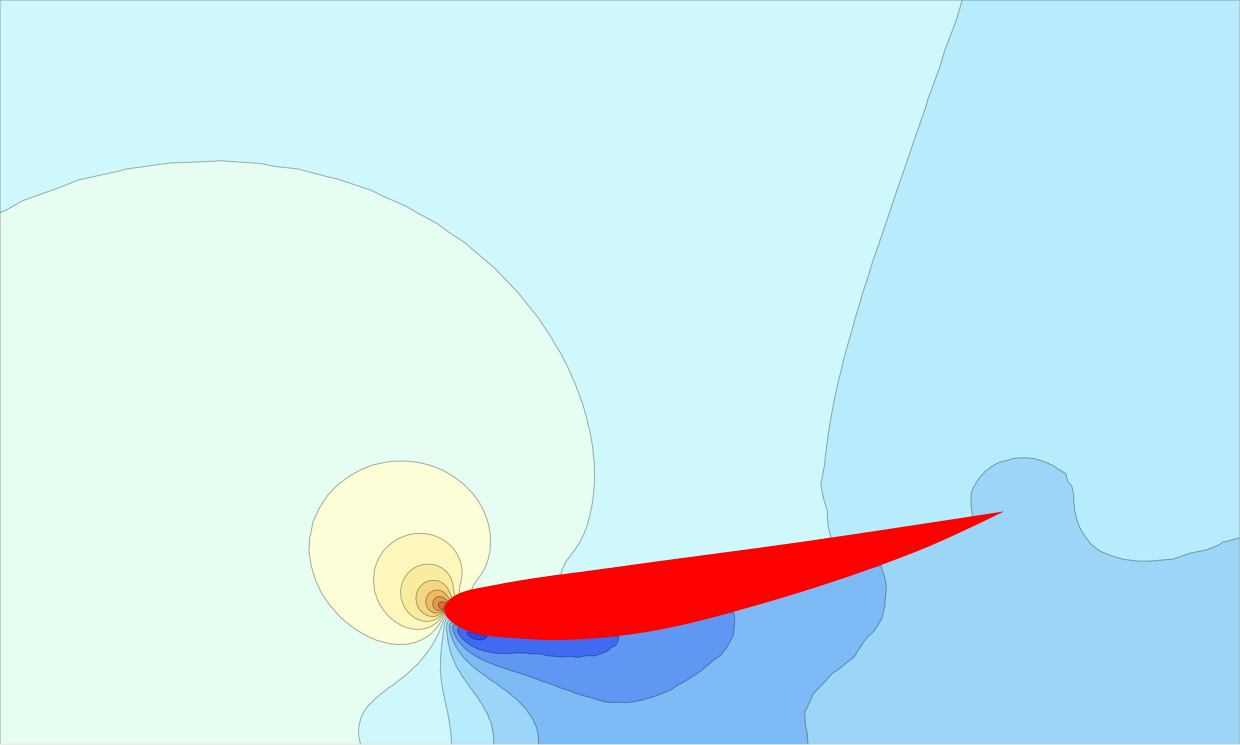 Druckverteilung um einen Flügel in Bodennähe